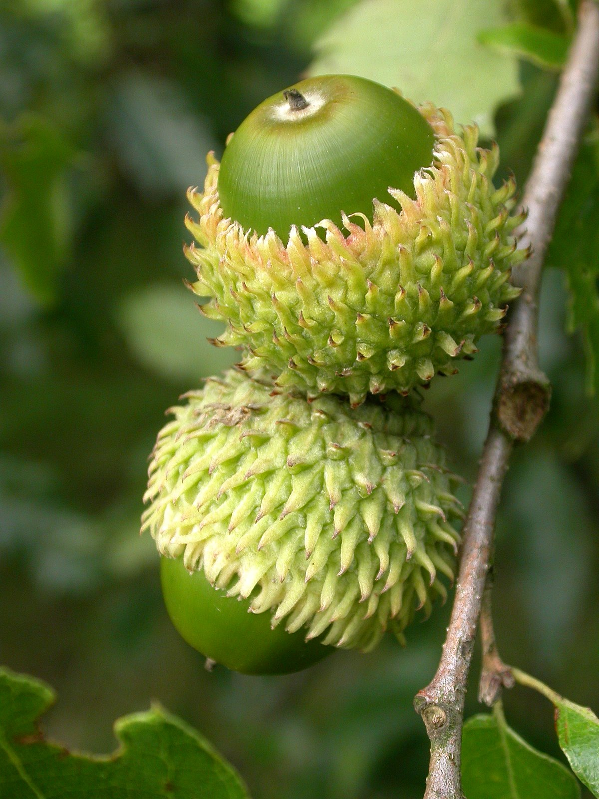 Quercus libani seeds